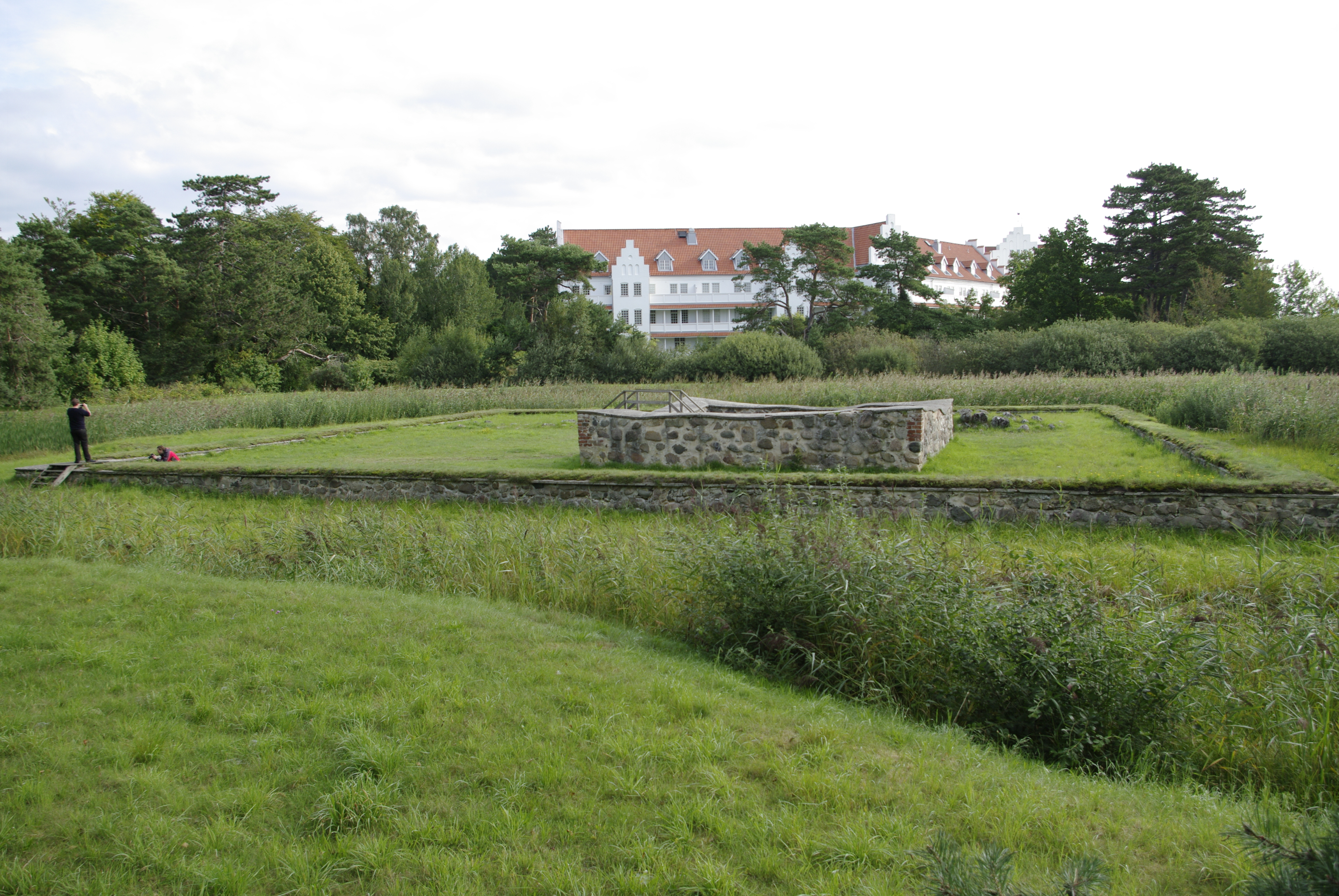 Falsterbohus slott med nya Falsterbohus i bakgrunden